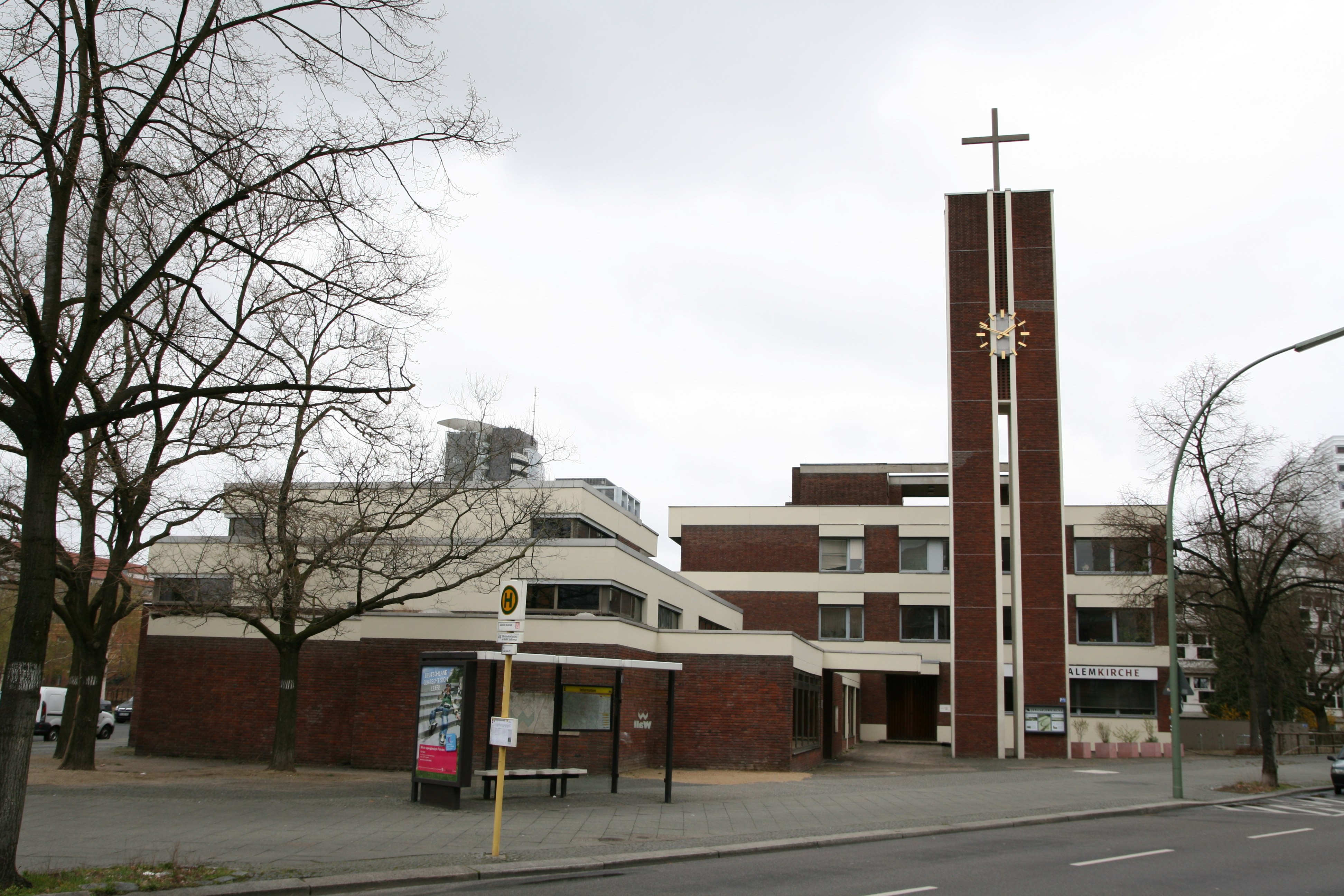 Jerusalemkirche in Berlin, Germany